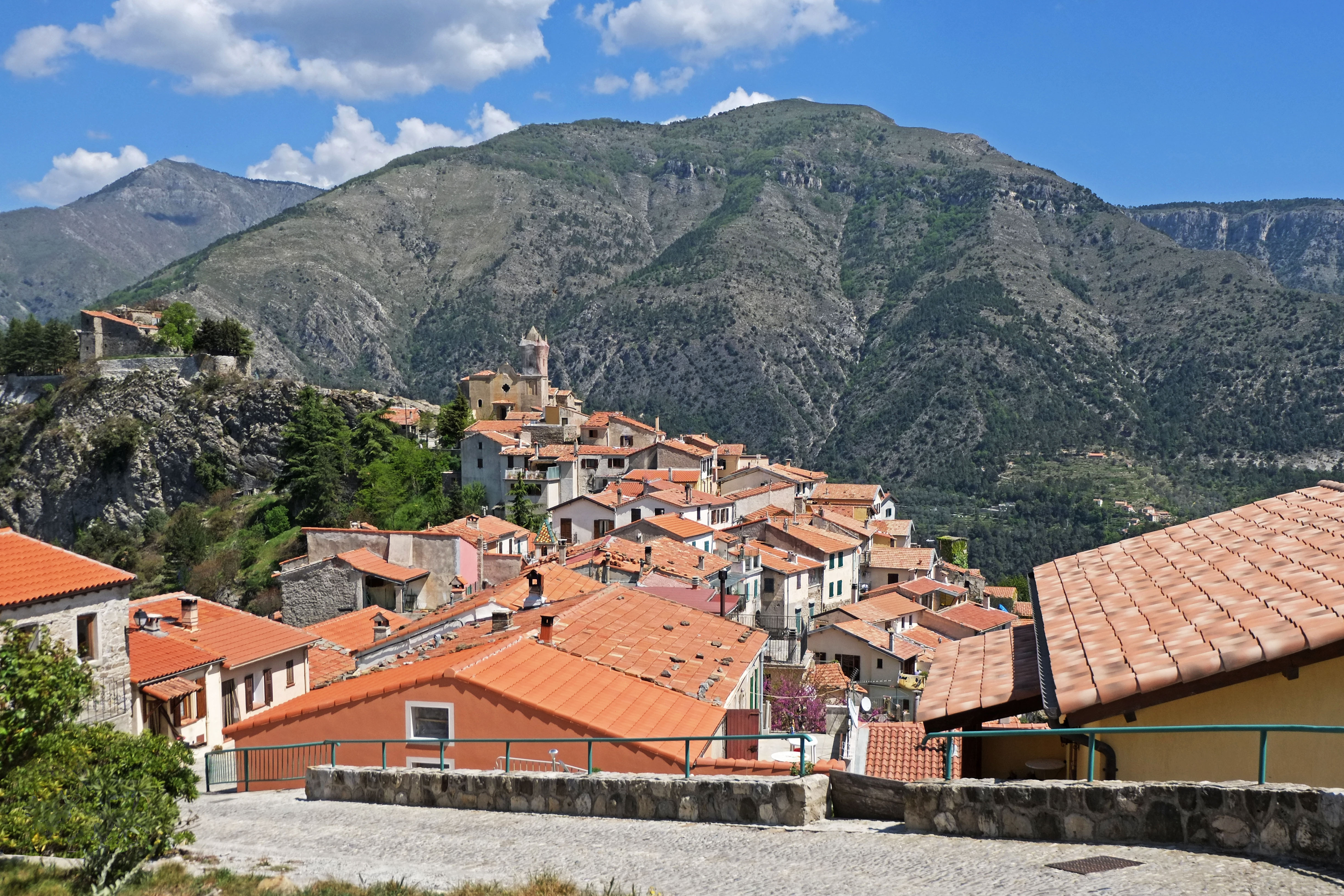 Vue de Piène Haute quand on arrive sur le village